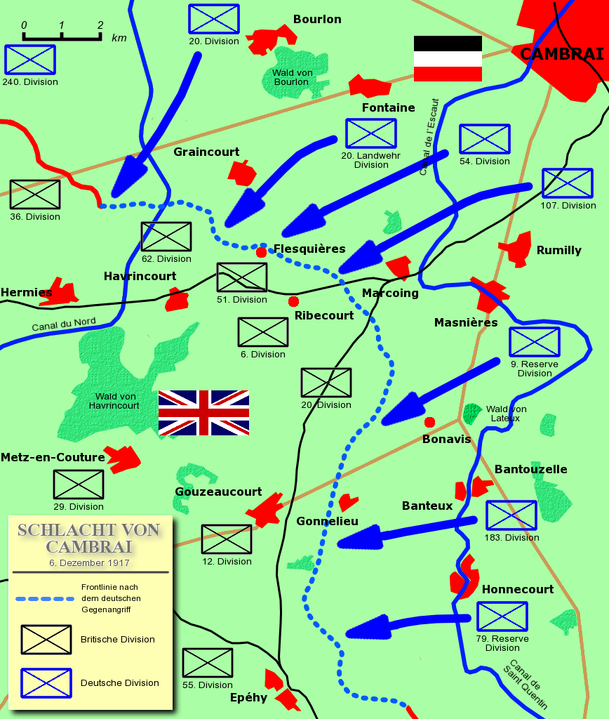 Source: self-made by User:W.wolny Low-Res-Version: Image:509px-Schlacht von Cambrai - Truppen D-Angriff.png